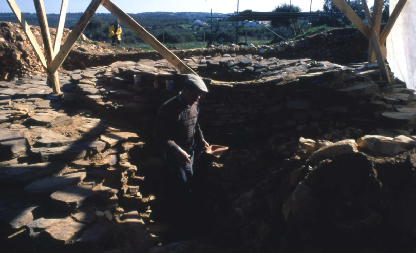 Alcalar 7